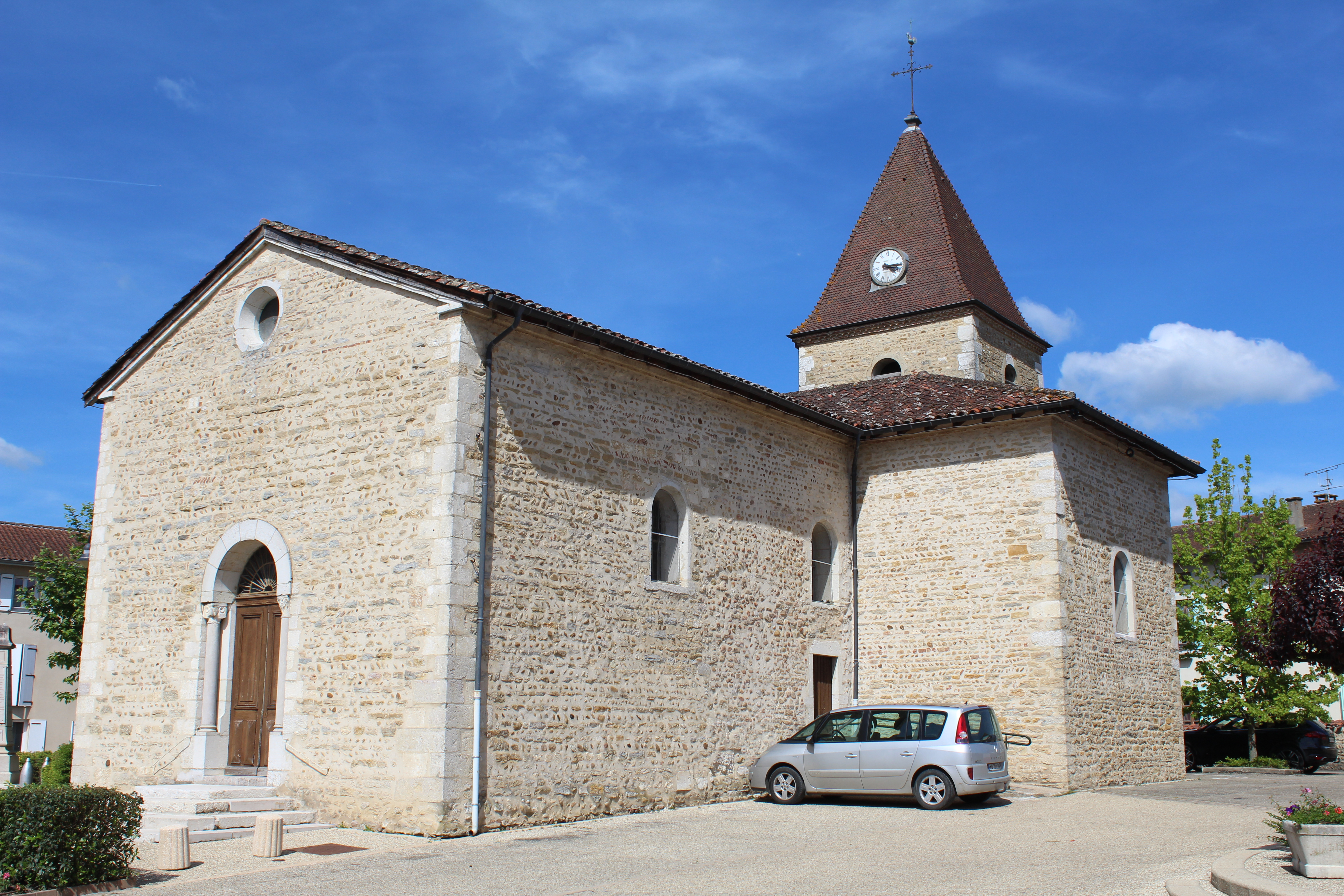 Église Saint-André de Saint-André-sur-Vieux-Jonc.